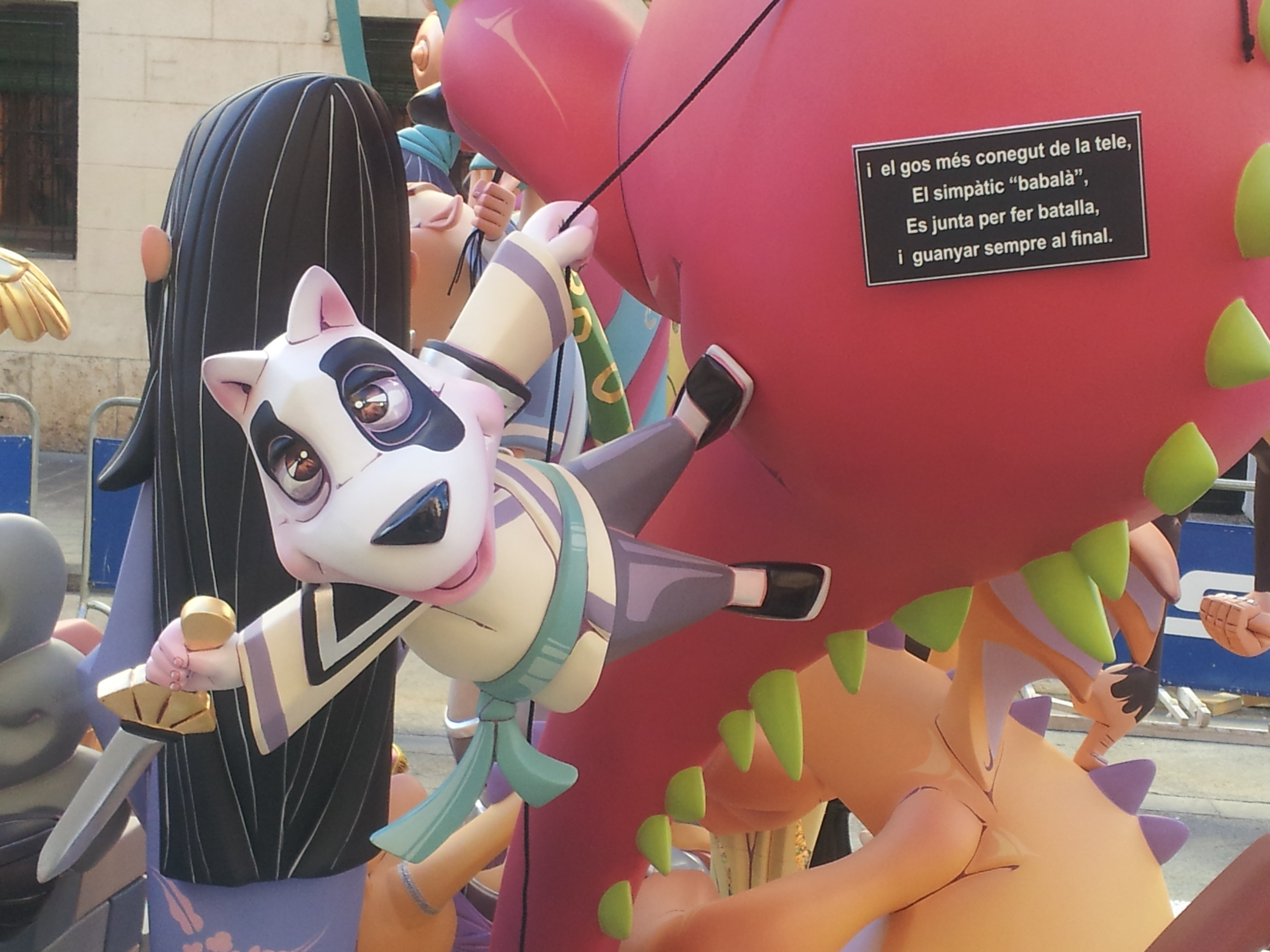 Falla infantil de Duc de Gaeta